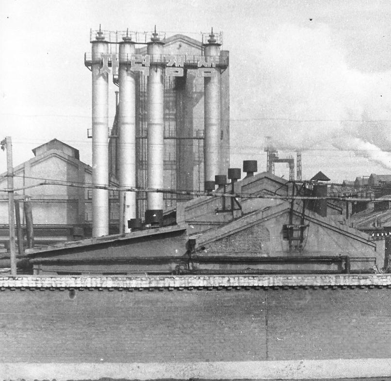 Fertilizer plant June 1972, Hamhung, North Korea